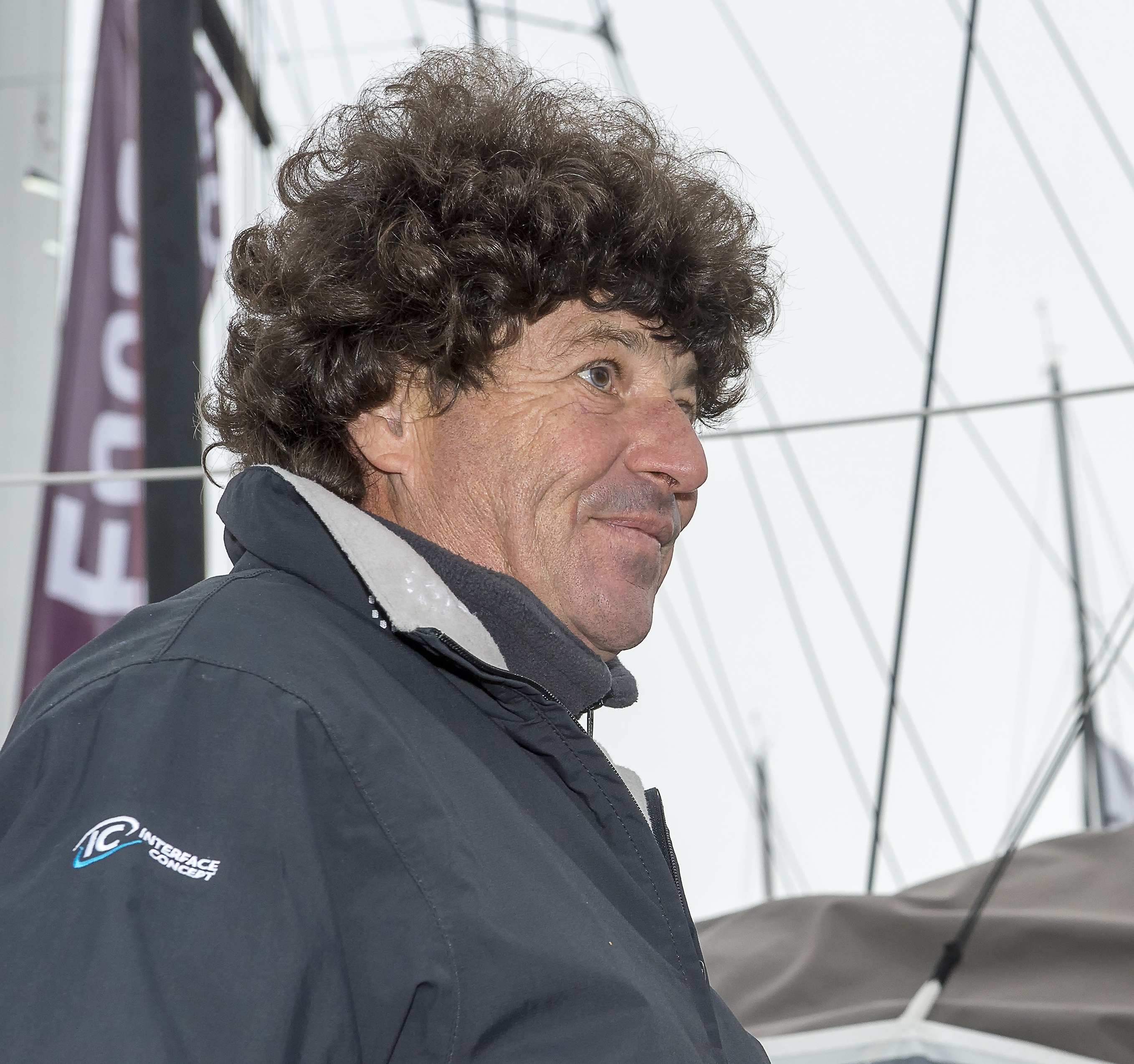 0071-Vendée 2012 (Ponton)